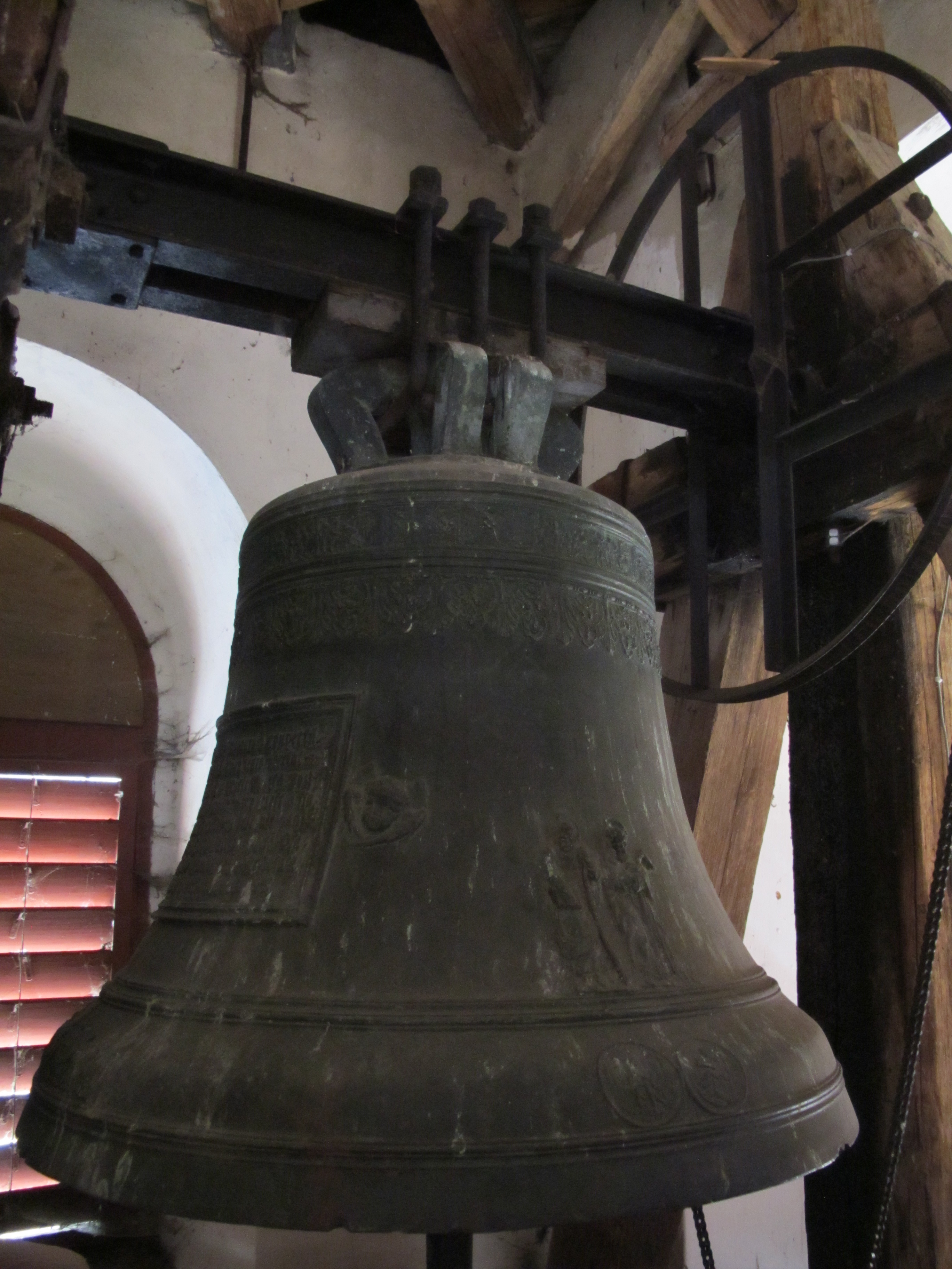 Zvonice u kostela v Zámrsku - zvon.